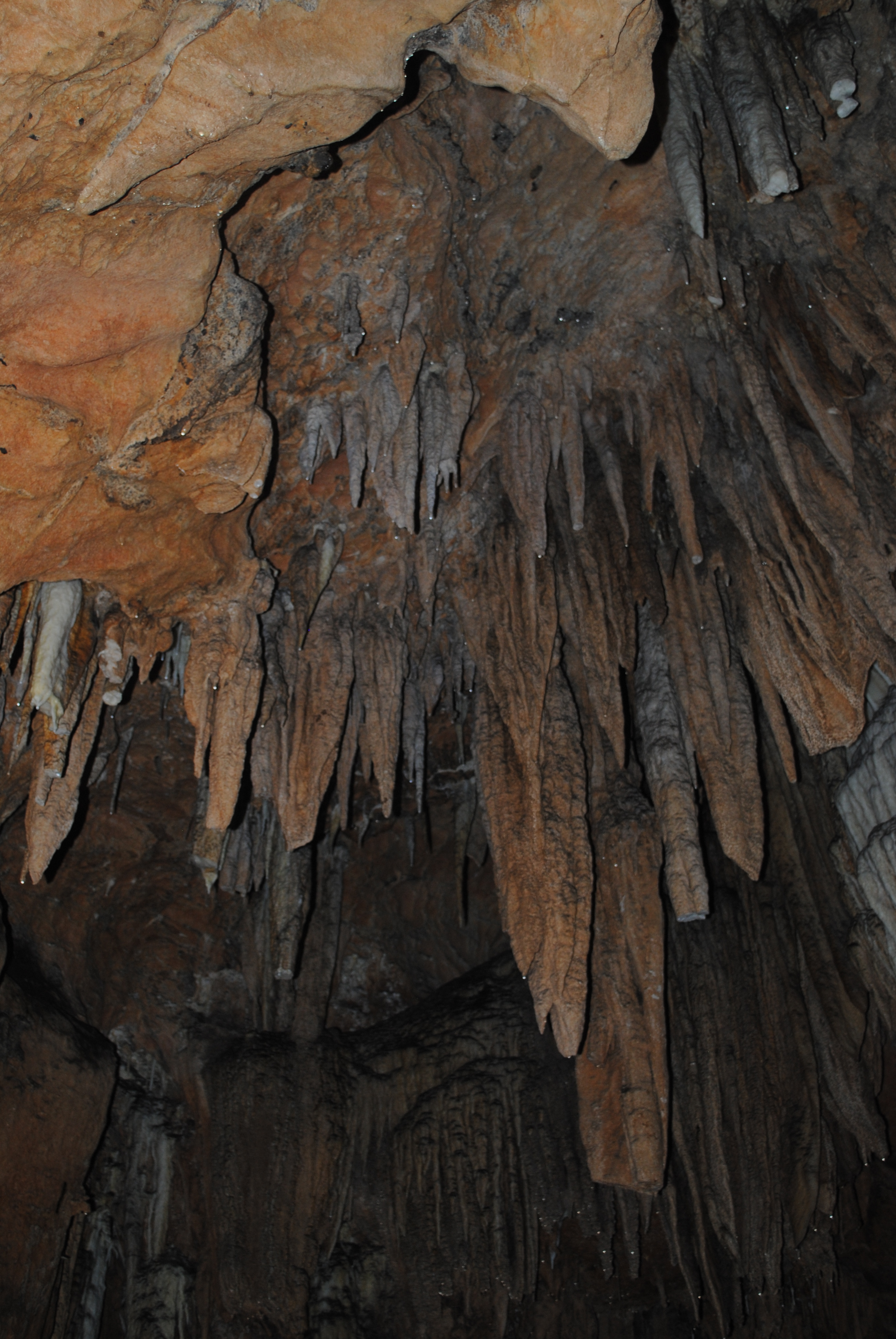 Fotografia de estalactites, no Parque Estadual de Campinhos no Paraná, em uma visita escolar. Incríveis formações de rochas sedimentares que se originam do teto (diferente da estalagmite, que crescem do chão), devido ao carbonato de cálcio que se arrasta junto à água que goteja.